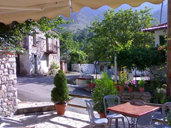 Λεχούρι Αχαΐας